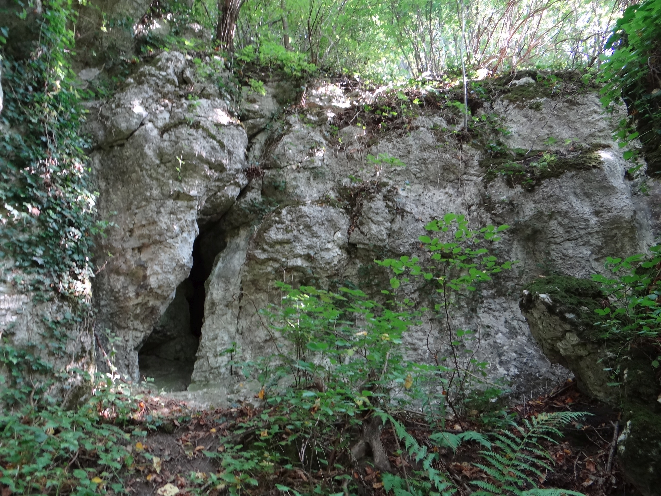 Jaskinia Mała na Wrzosach